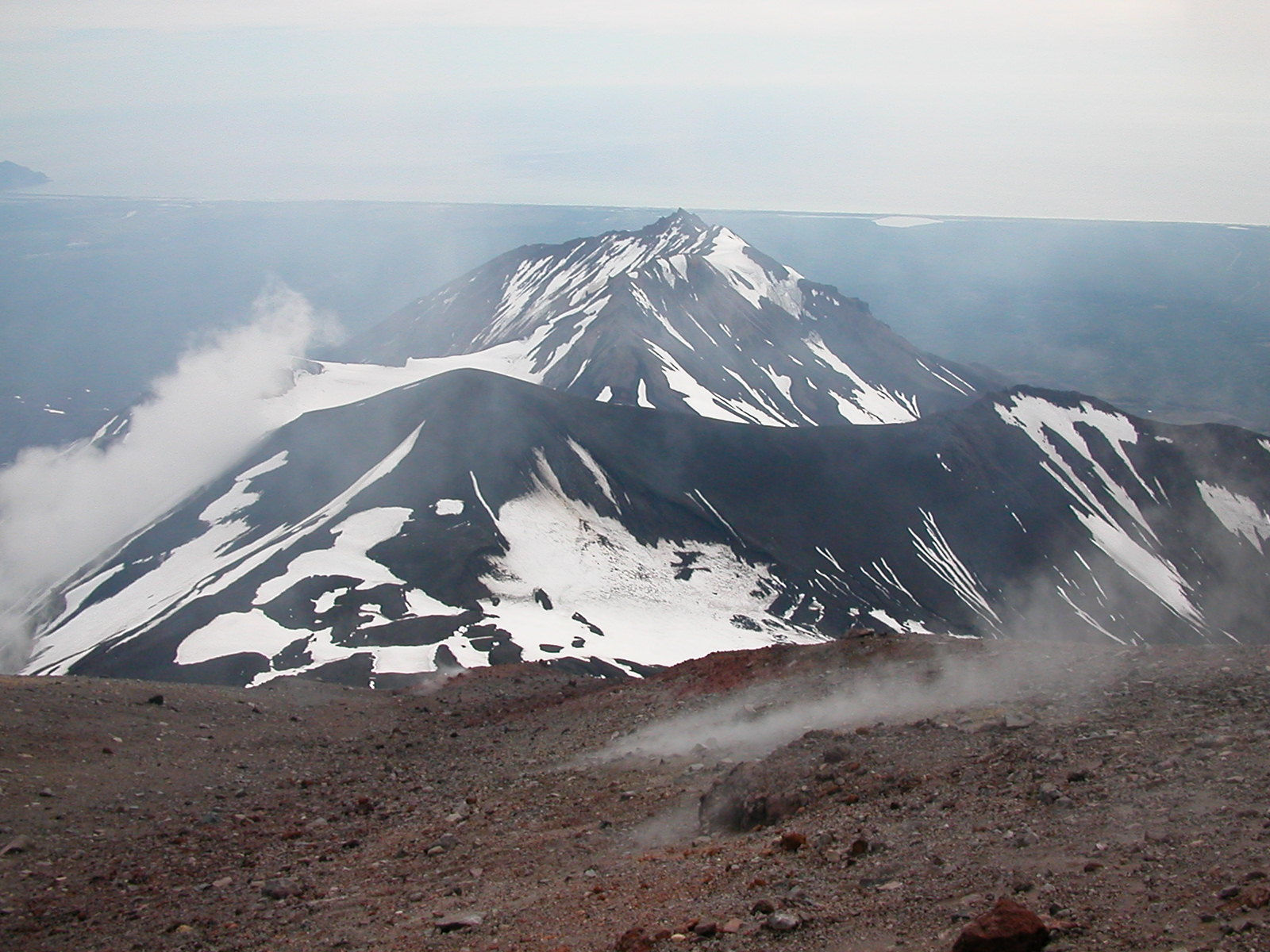 вид на Козельский вулкан. Камчатка